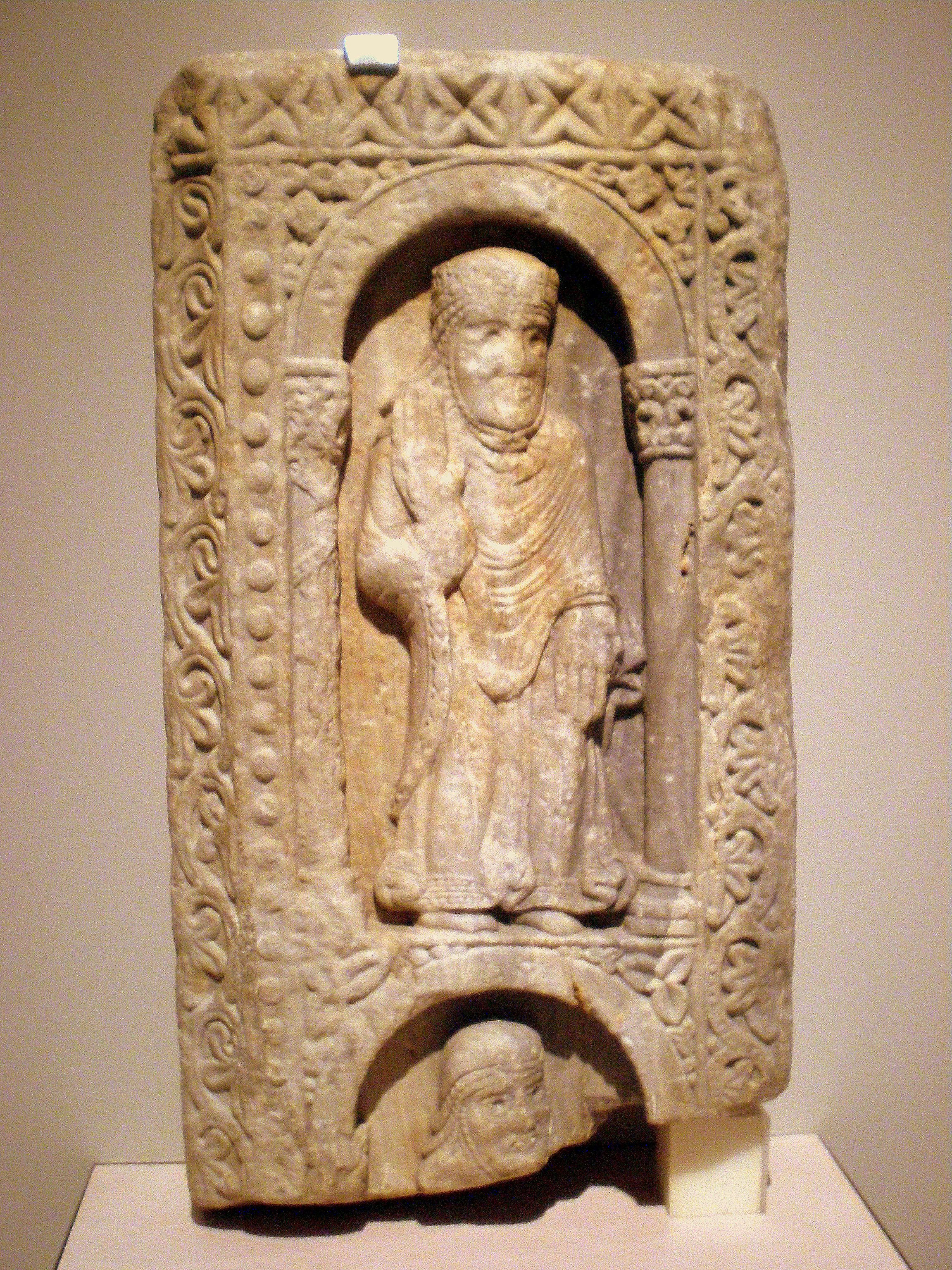 Relleu amb dues figures femenines de San Paio de Antealtares. Santiago de Compostela, monestir de San Paio de Antealtares (?), 1150. Marbre.